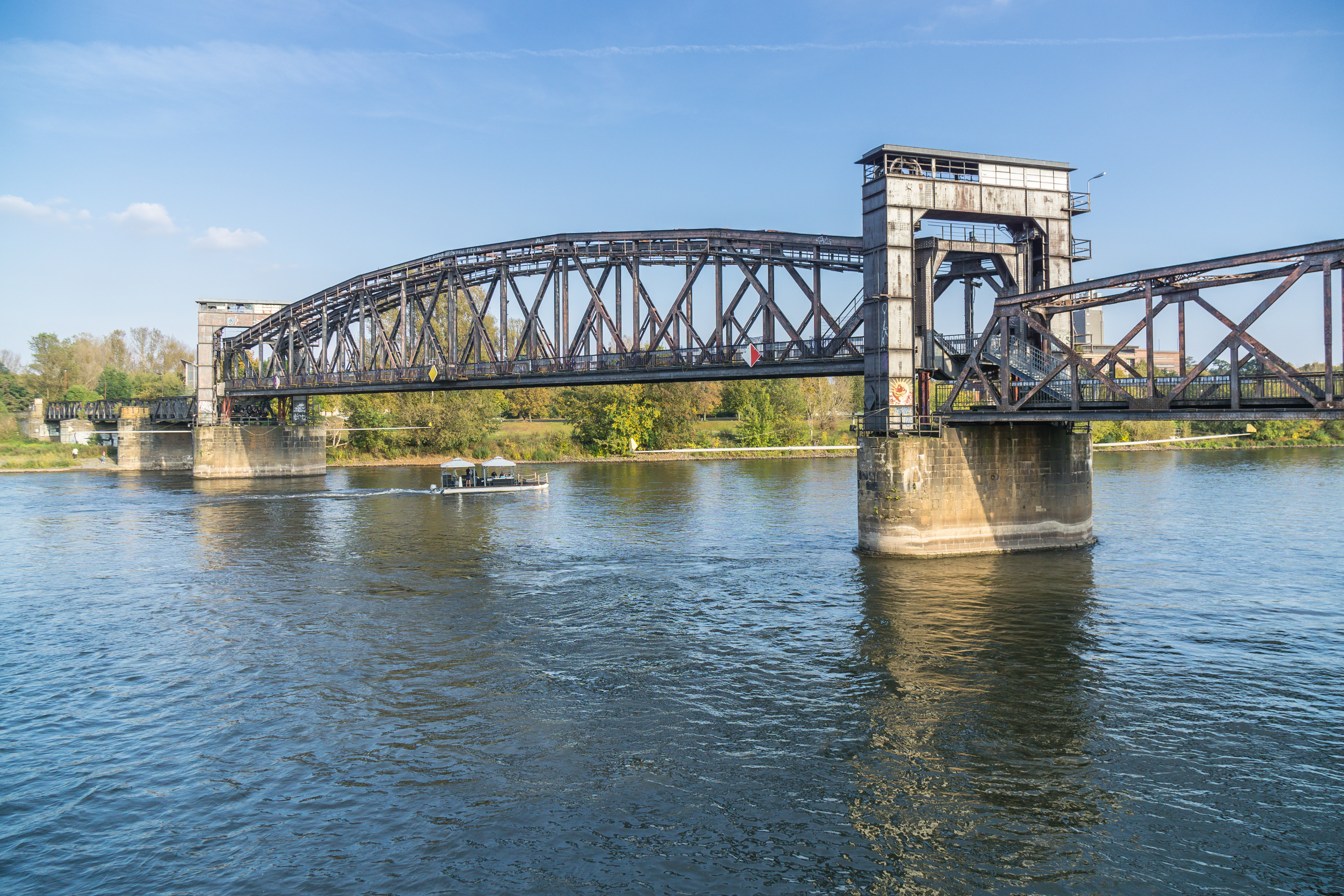 Hubbrücke über die Elbe, Hammersteinweg in Magdeburg Stt Magdeburger Altstadt